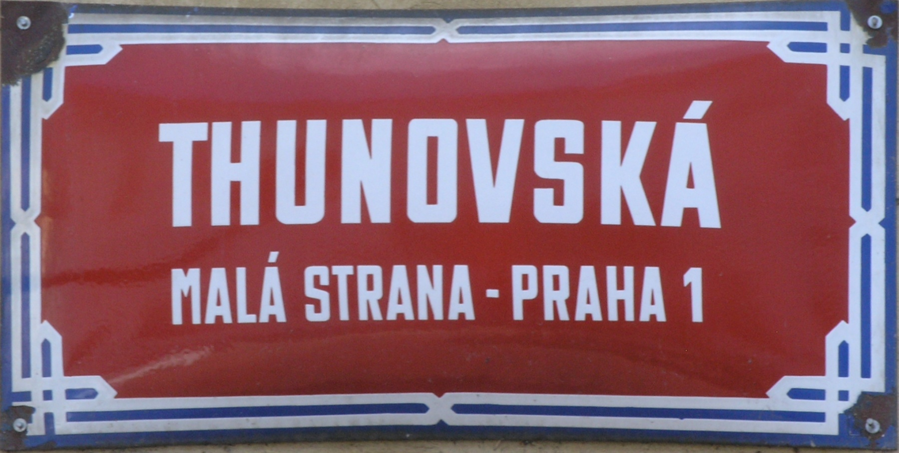 Praha, Malá Strana - Thunovská (cedule)